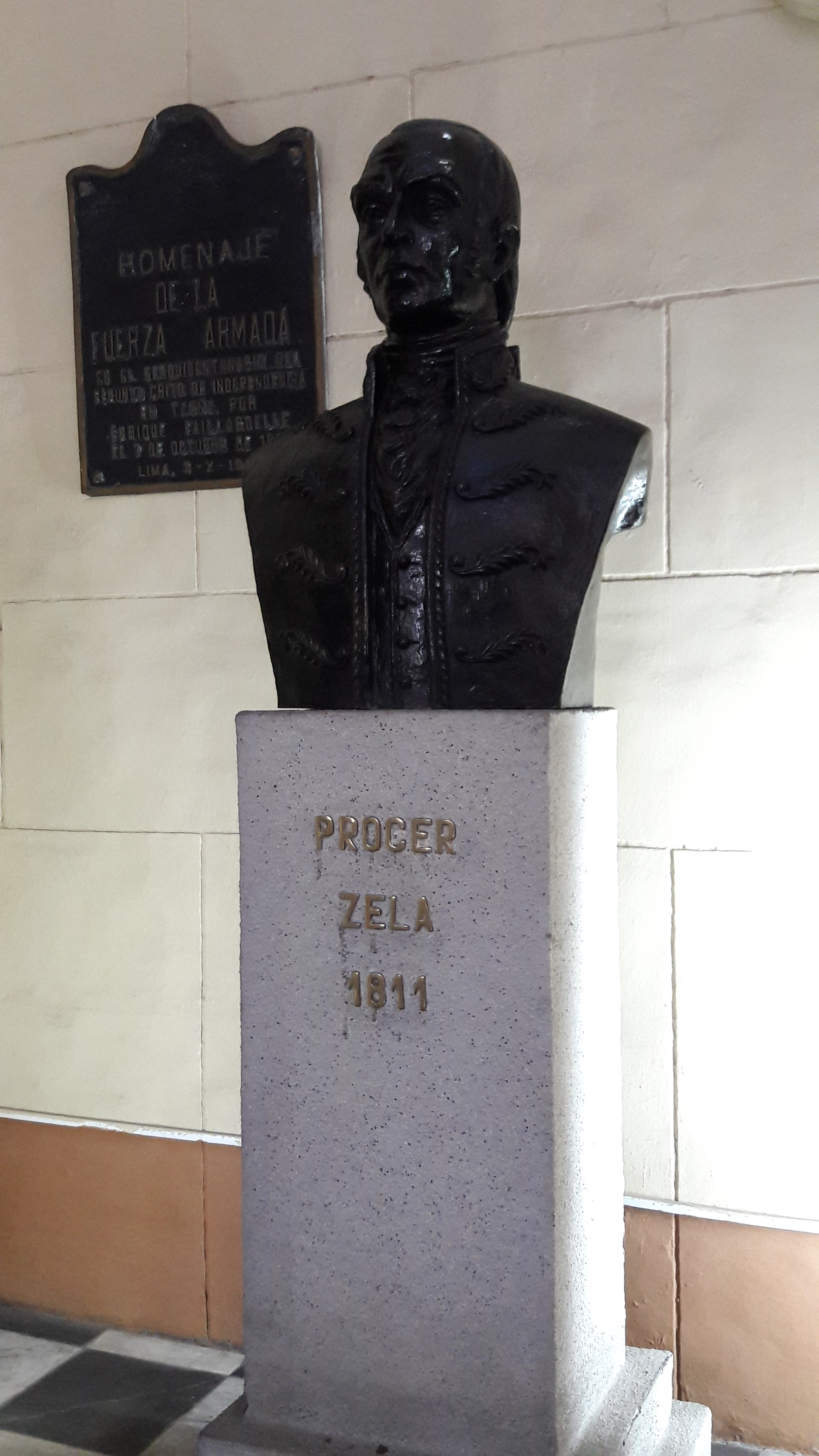 Prócer Zela 1811